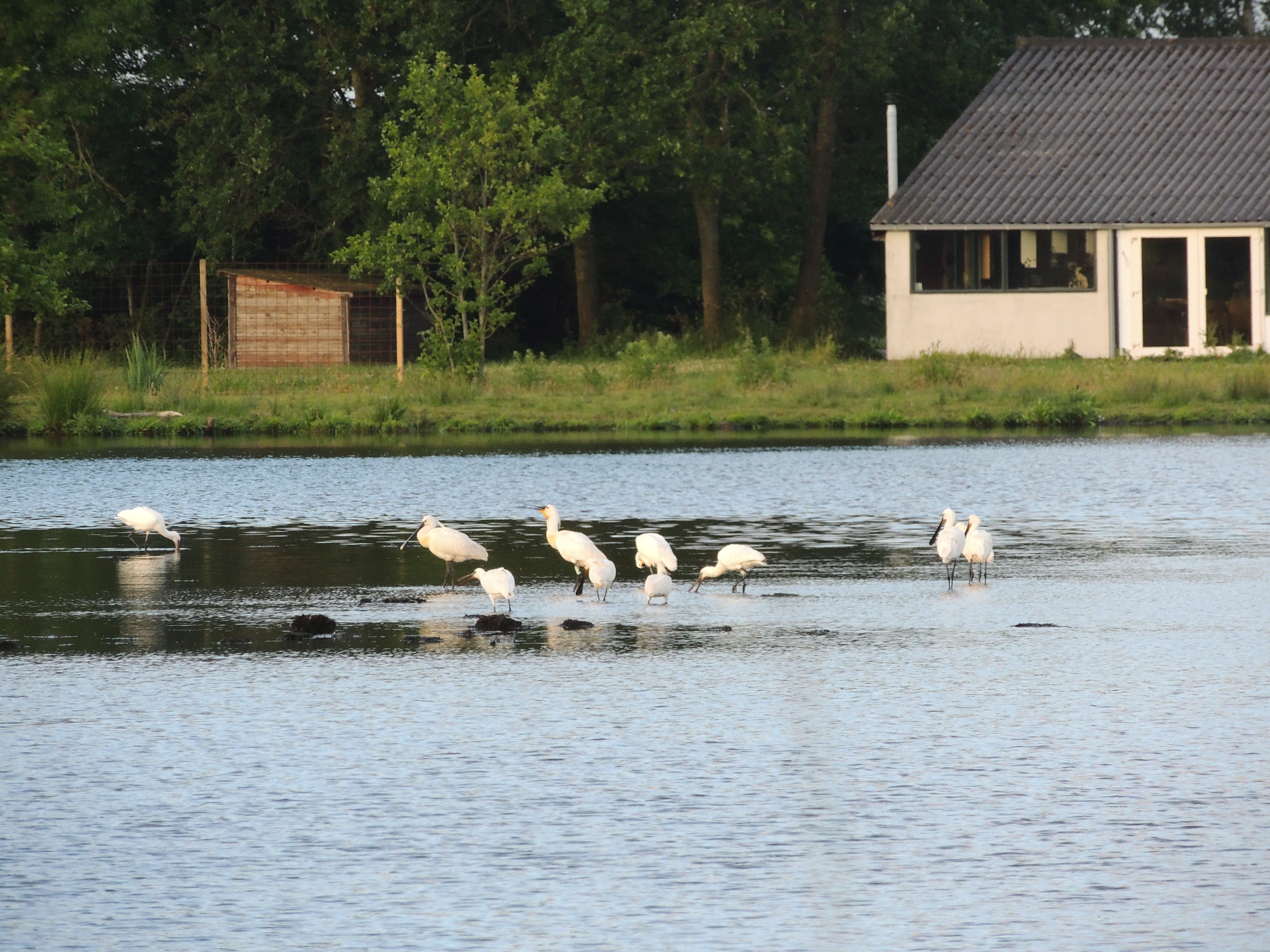 Lepelaars This is a photo or sound file made in De Alde Feanen National Park in the Netherlands, with the main subject of the file in the category: animals